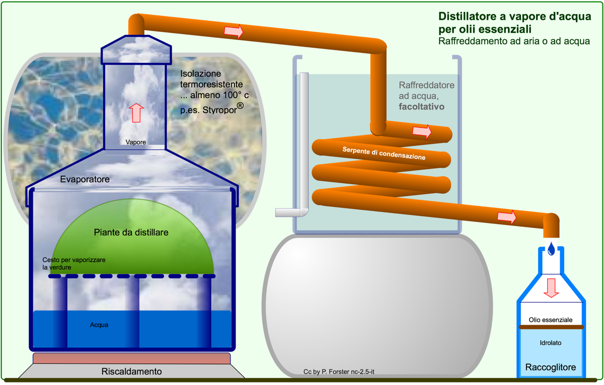 Distillatore a vapore d'acqua per olii essenziali: raffreddamento ad aria o ad acqua, ad uso casalinga